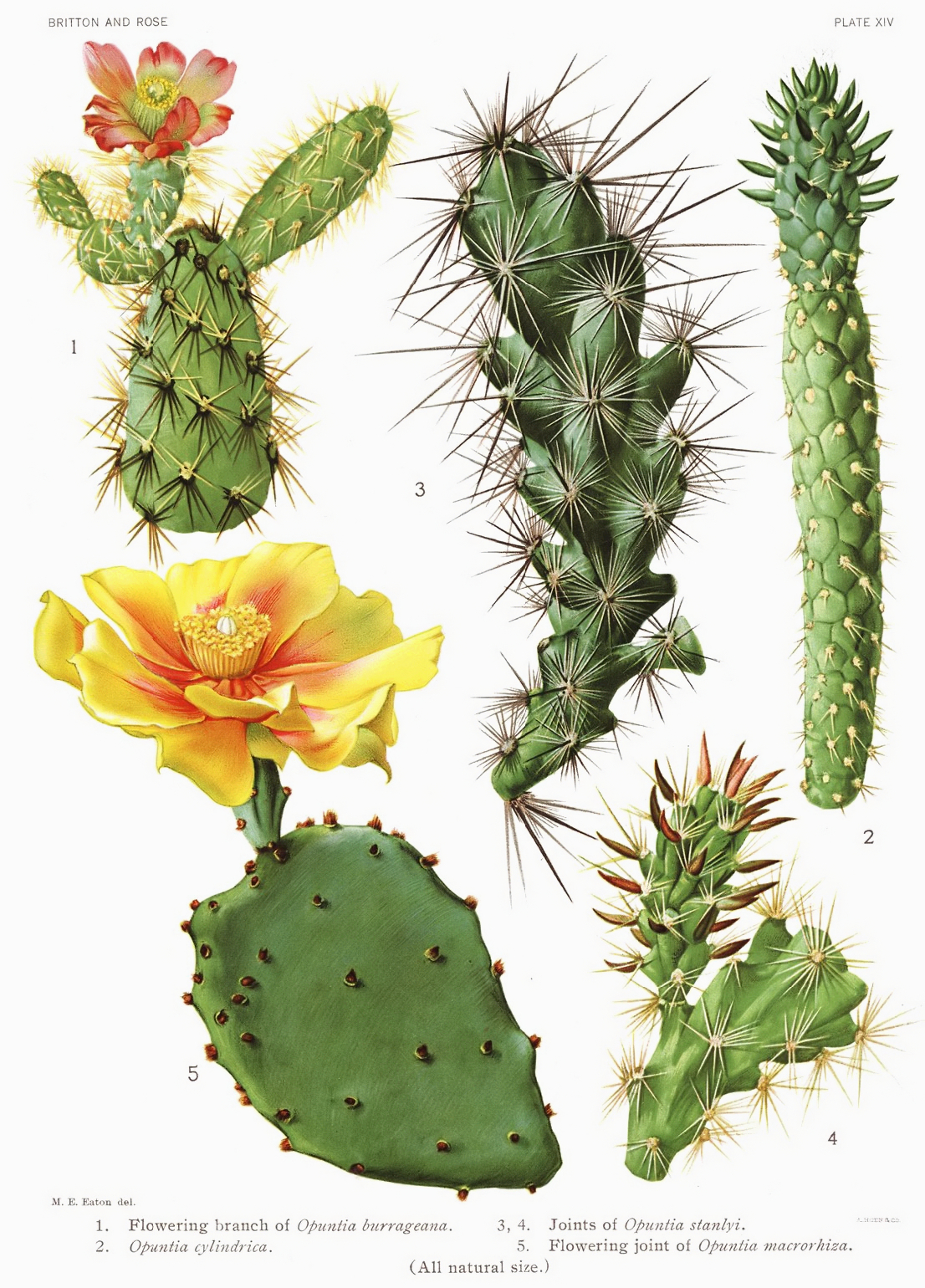 1. Cylindropuntia alcahes var. burrageana, 2. Austrocylindropuntia cylindrica, 3, 4. Grusonia emoryi, 5. Opuntia macrorhiza.